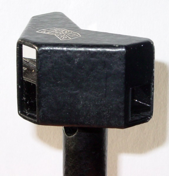 Kreuzvisier der Fa. Hensold wie es zur Absteckung rechter Winkel in der Vermessung benutzt wird.